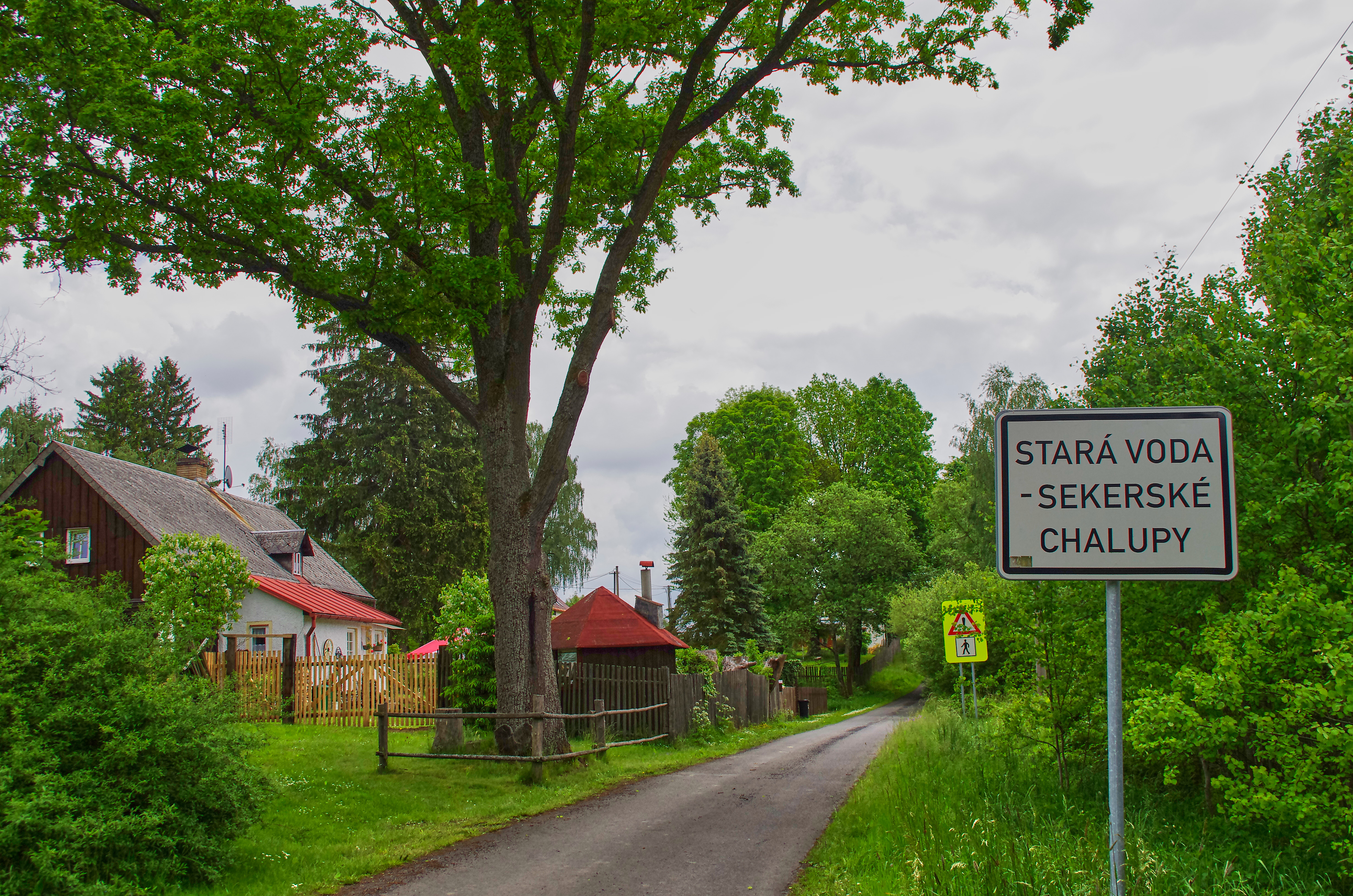 Sekerské Chalupy - vjezd do obce This image was acquired during the event Wikiměsto Mariánské Lázně.